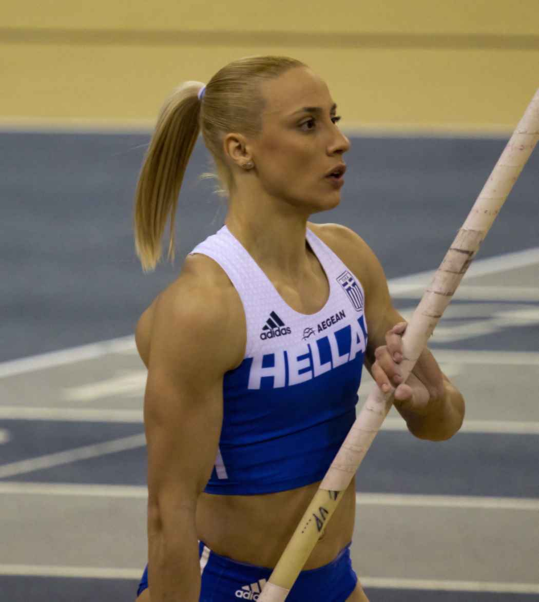 EKI30326 finale polsstok kiriakopoulou